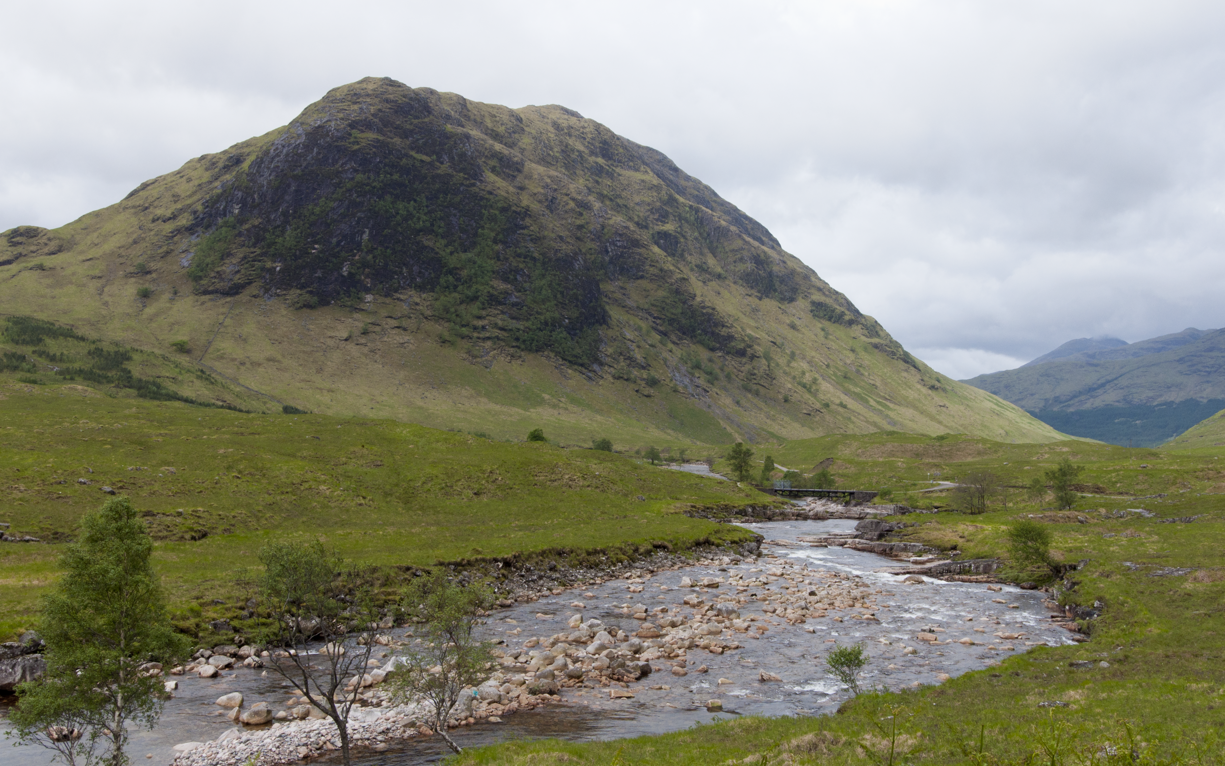 Beinn Ceitlein langs de rivier Etive in Glen Etive, Schotland